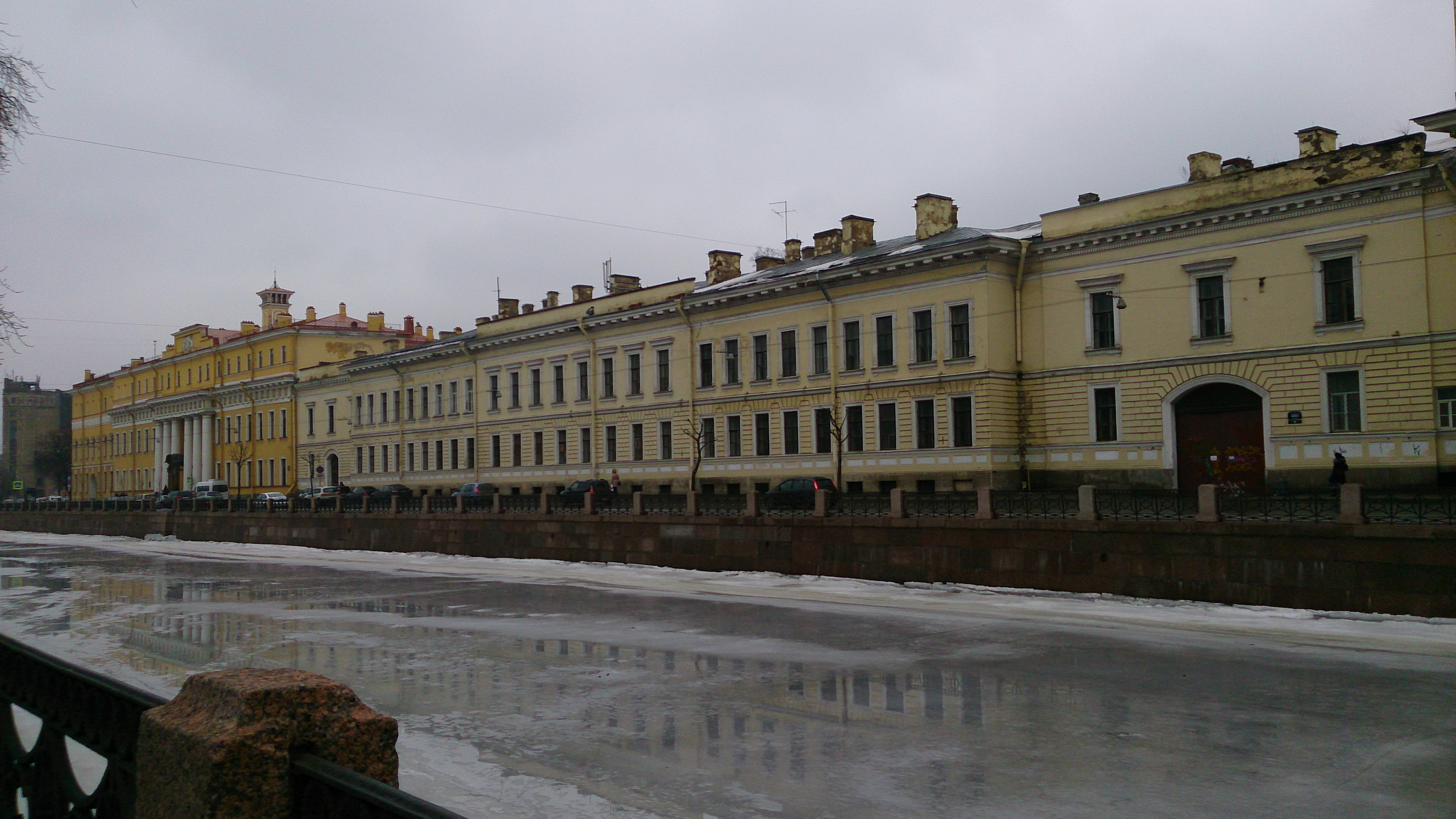 Naberegnaya moyki 98_2